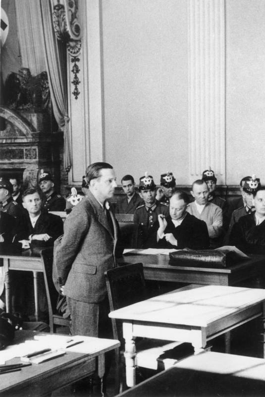 This description has been identified as biased or incorrect: NS-PropagandaVolksgerichtshof, Hellmuth Stieff Vom Volk gerichtet. Vor den Schranken des Volksgerichtshofes fand am Dienstag [7.8.1944] nach zweitägigen Verhandlungen das verbrecherische Attentat des 20. Juli seine gerechte Sühne. Der Angeklagte Stieff bei der Vernehmung; in heller Jacke der Angeklagte Höppner. 8-8-44